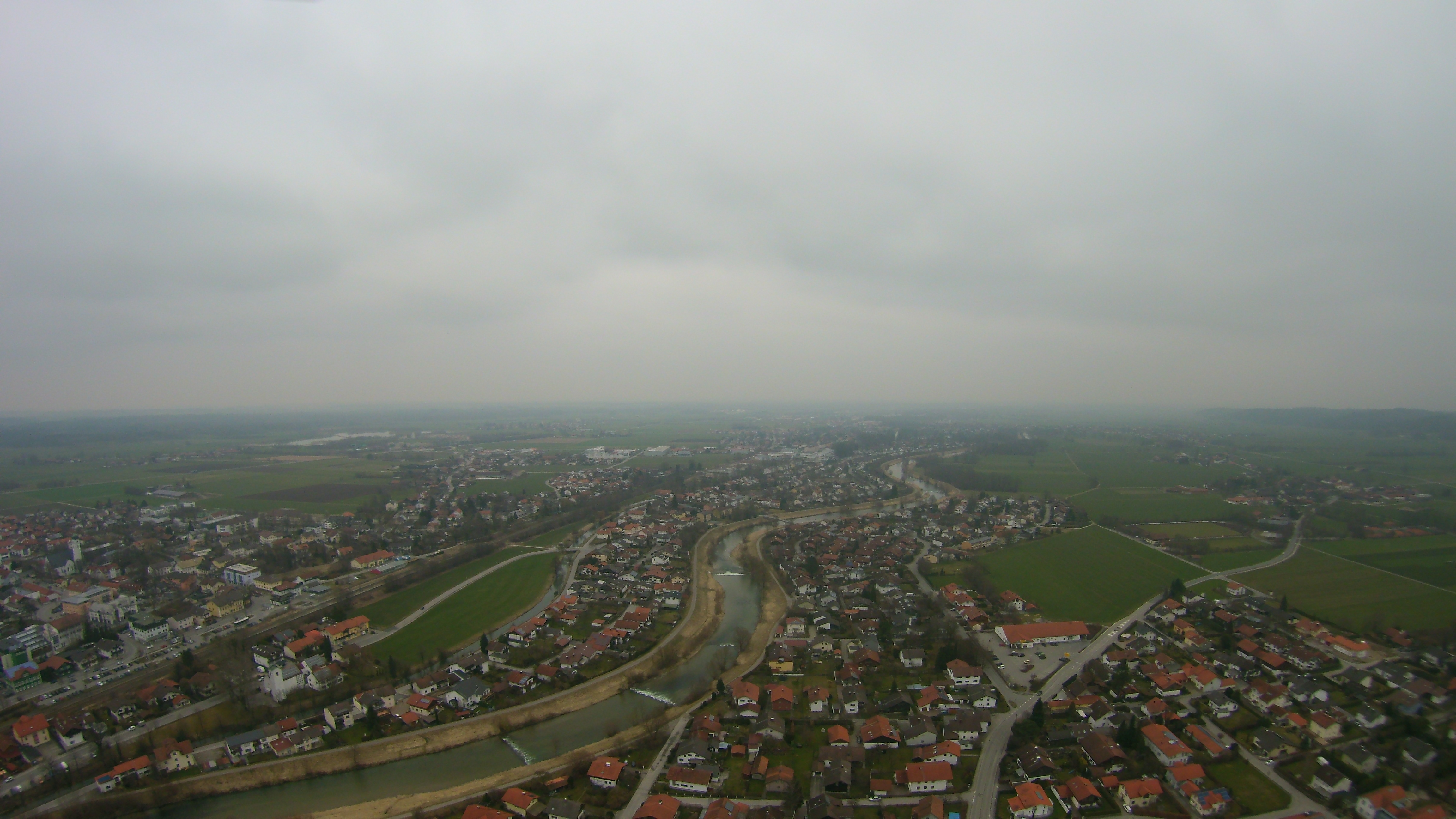 83052 Bruckmühl, Germany